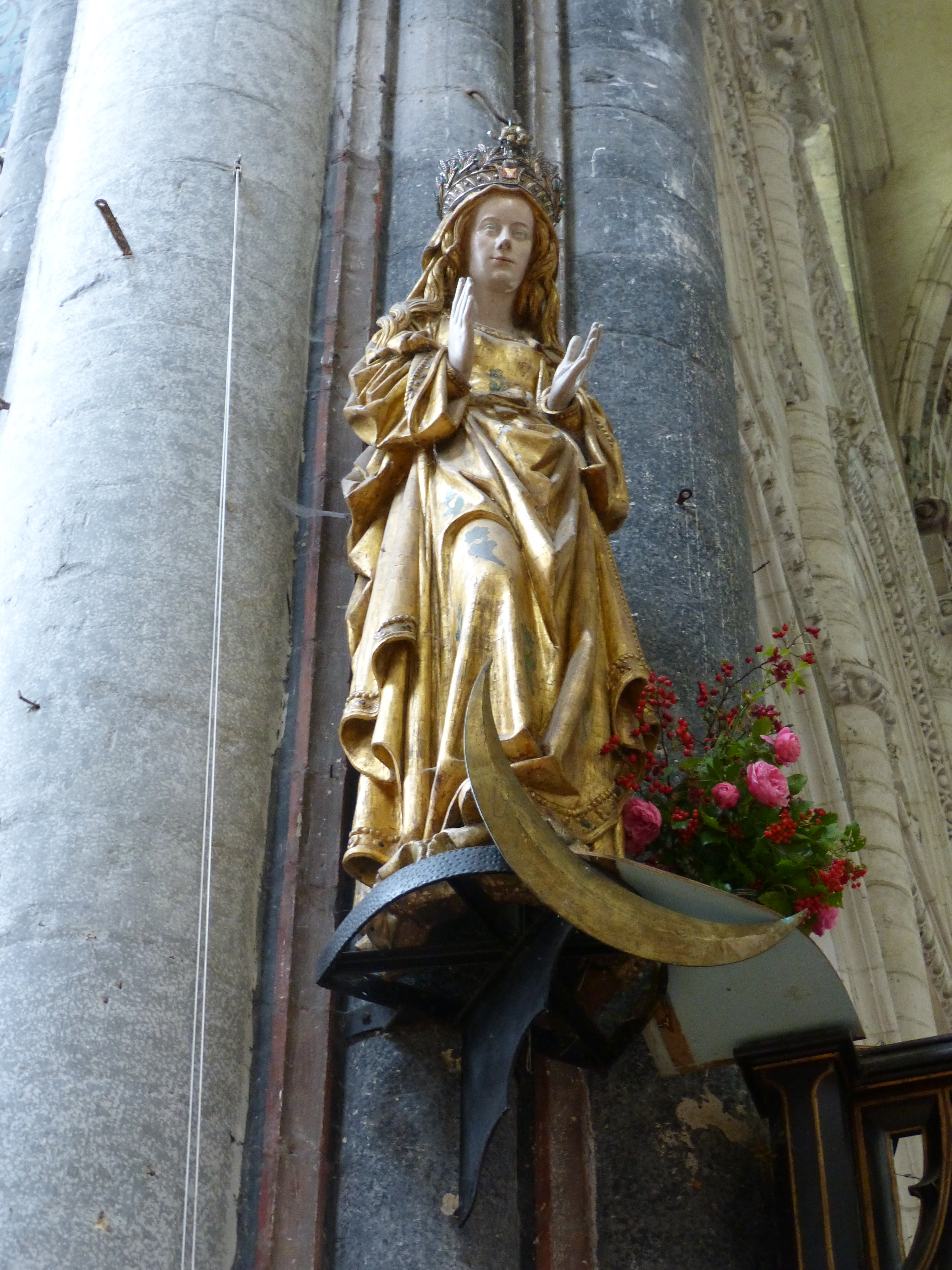 A côté de l'autel, près du jubé, la statue de Notre-Dame Panetière